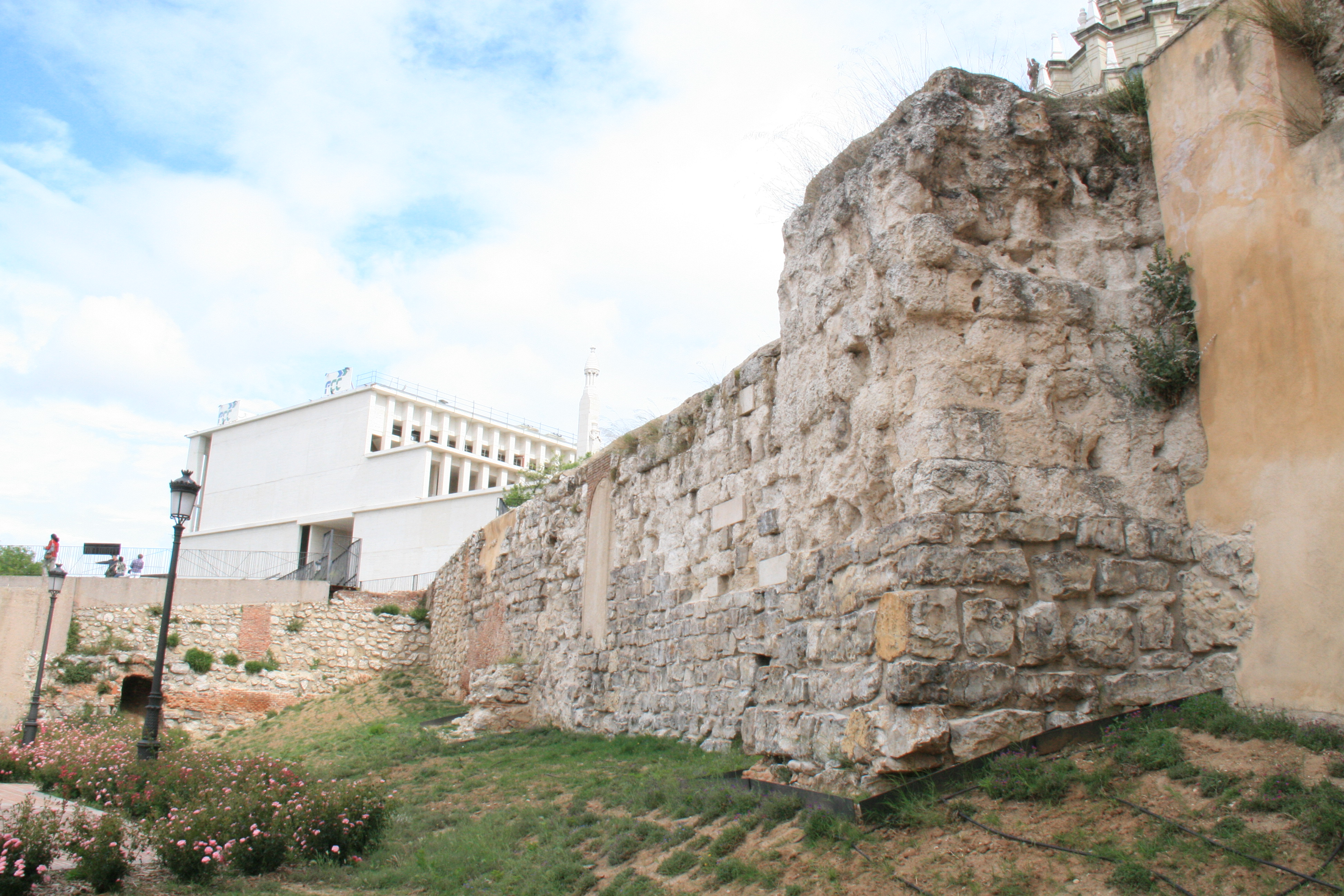 Murallas de Madrid